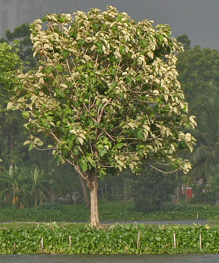 Teak or Sagwan Tectona grandis in Kolkata, West Bengal, India.